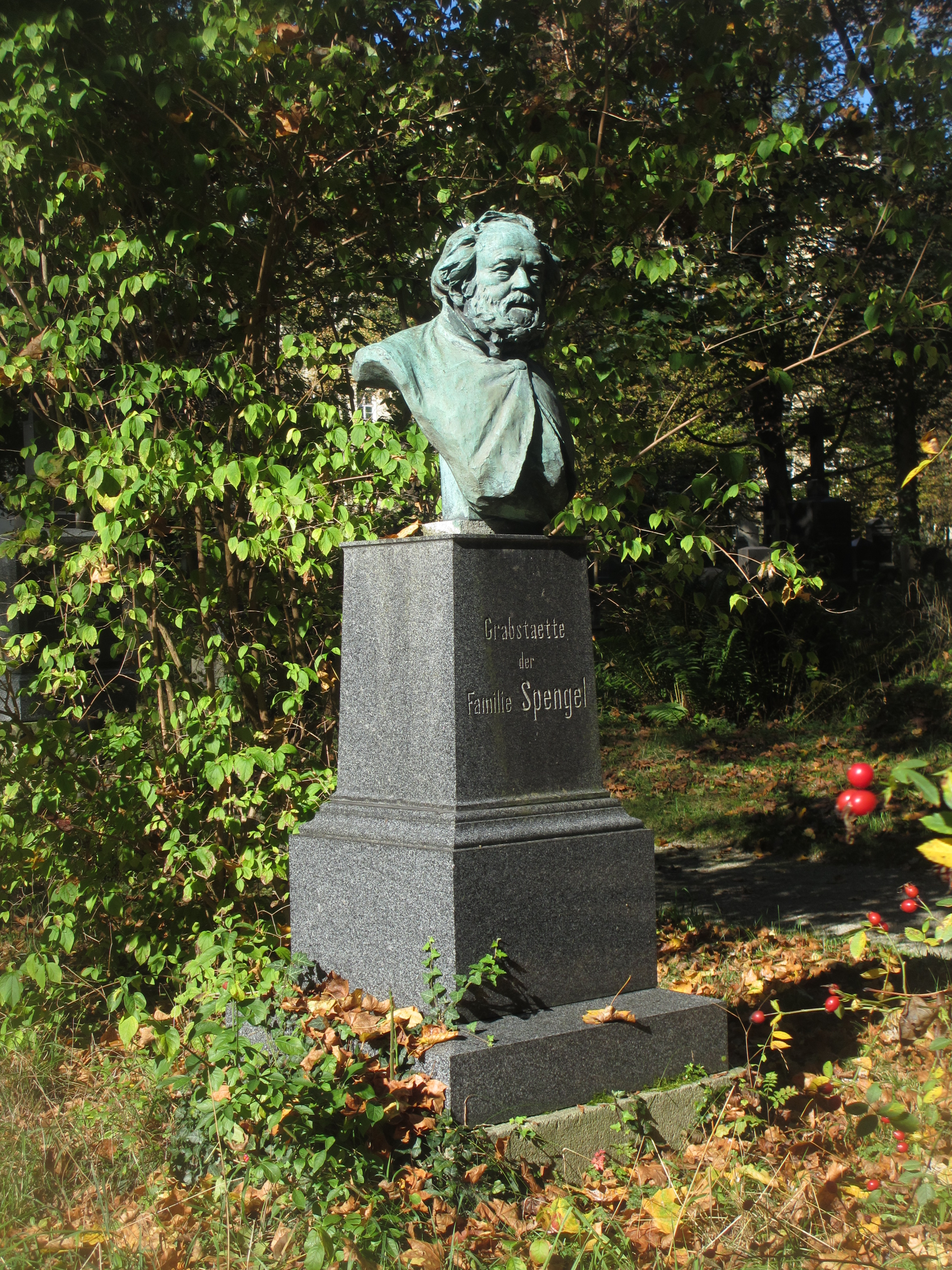 Grab von Leonhard Spengel auf dem Alten Suedlichen Friedhof in Muenchen-Graeberfeld GF-17-2-3